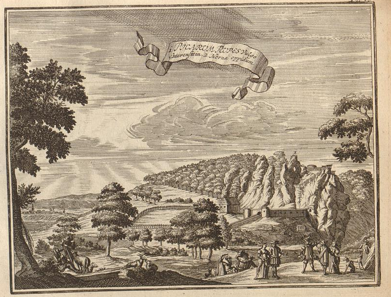 Ansicht der Externsteine aus der Monumenta paderbornensia, 2. Ausgabe 1672